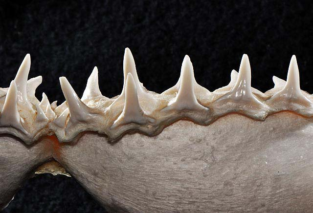 Negaprion brevirostris